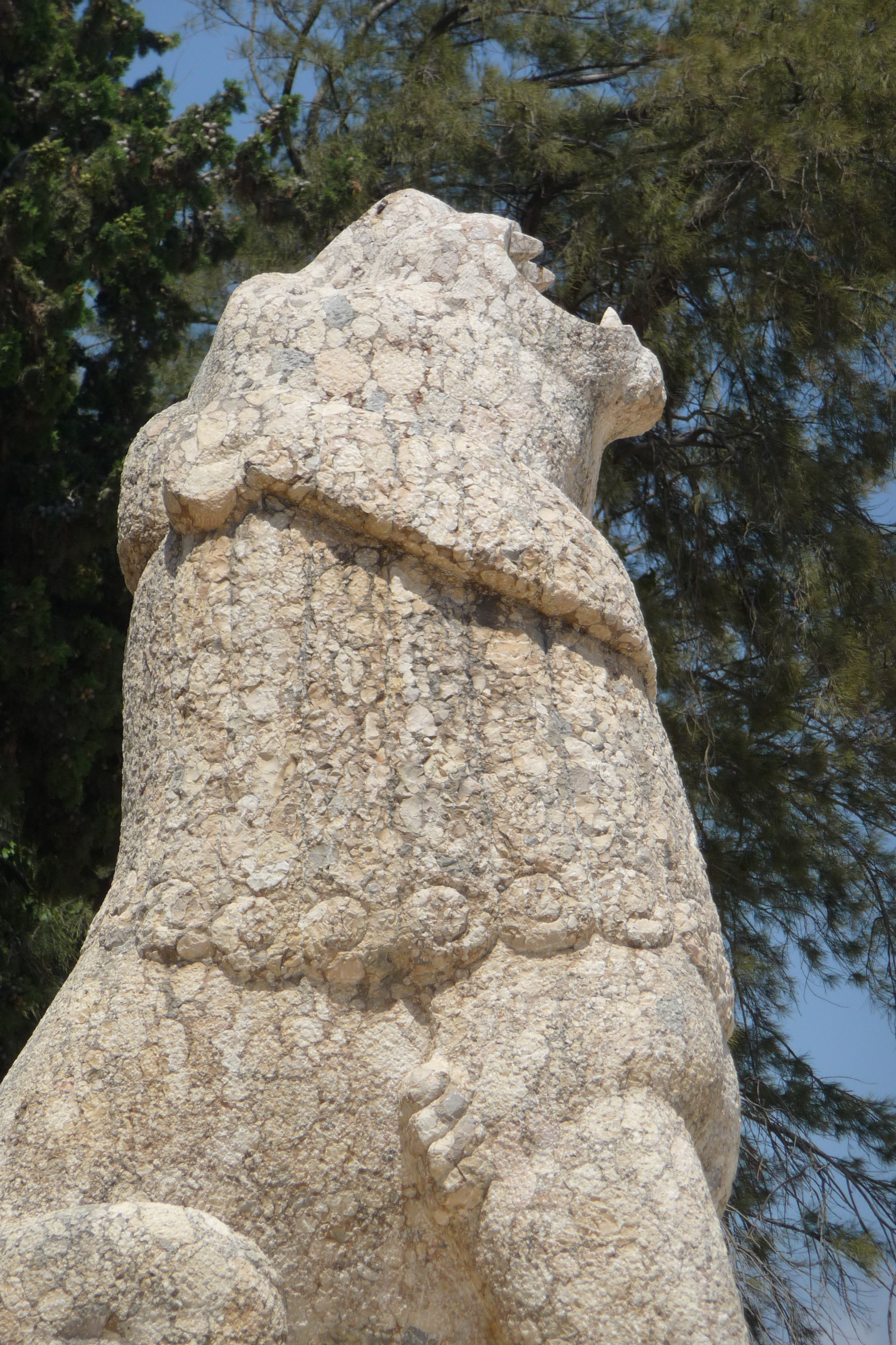 אנדרטה, אבן